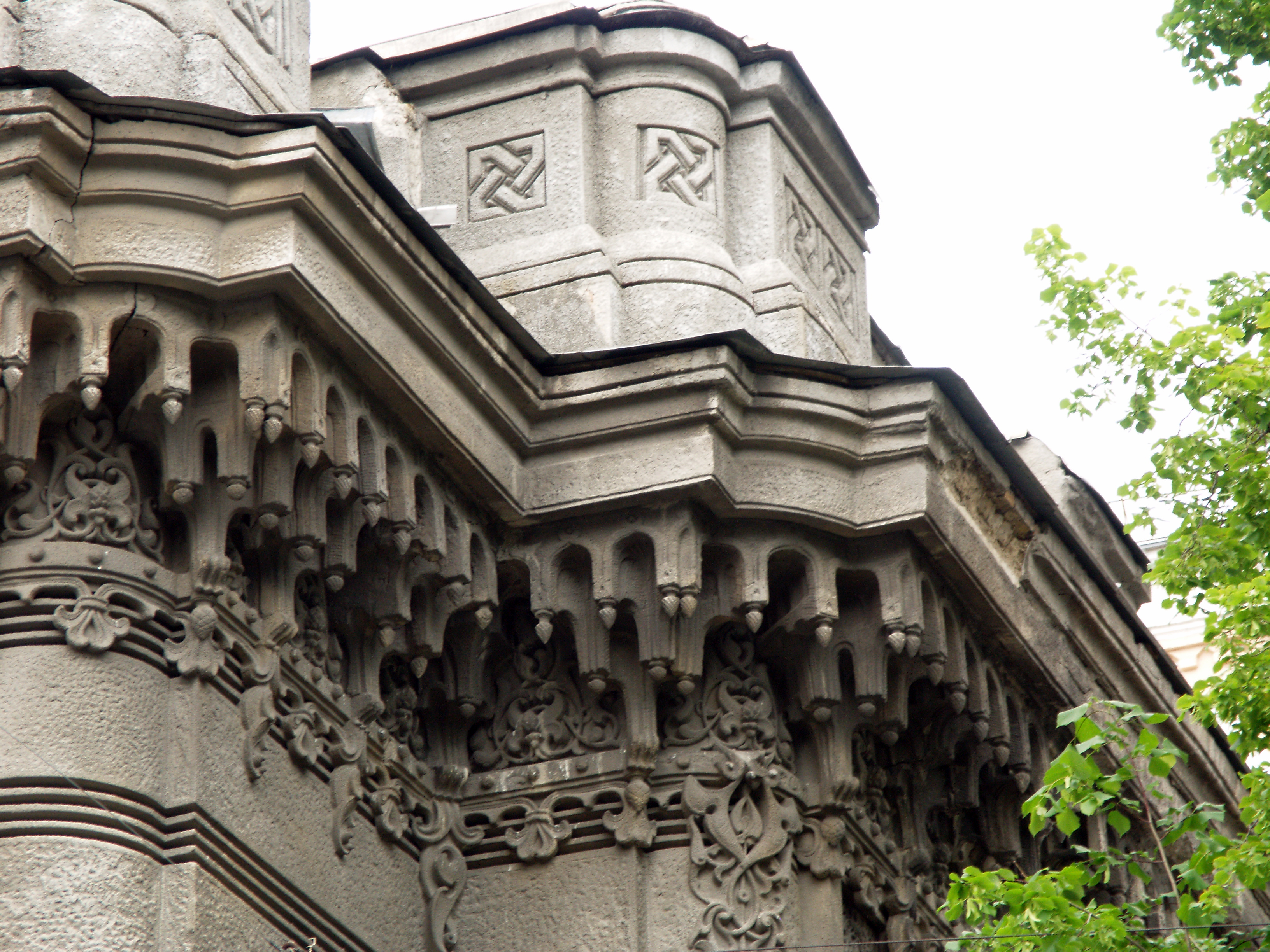 Україна, Київ - Кенаса караїмська